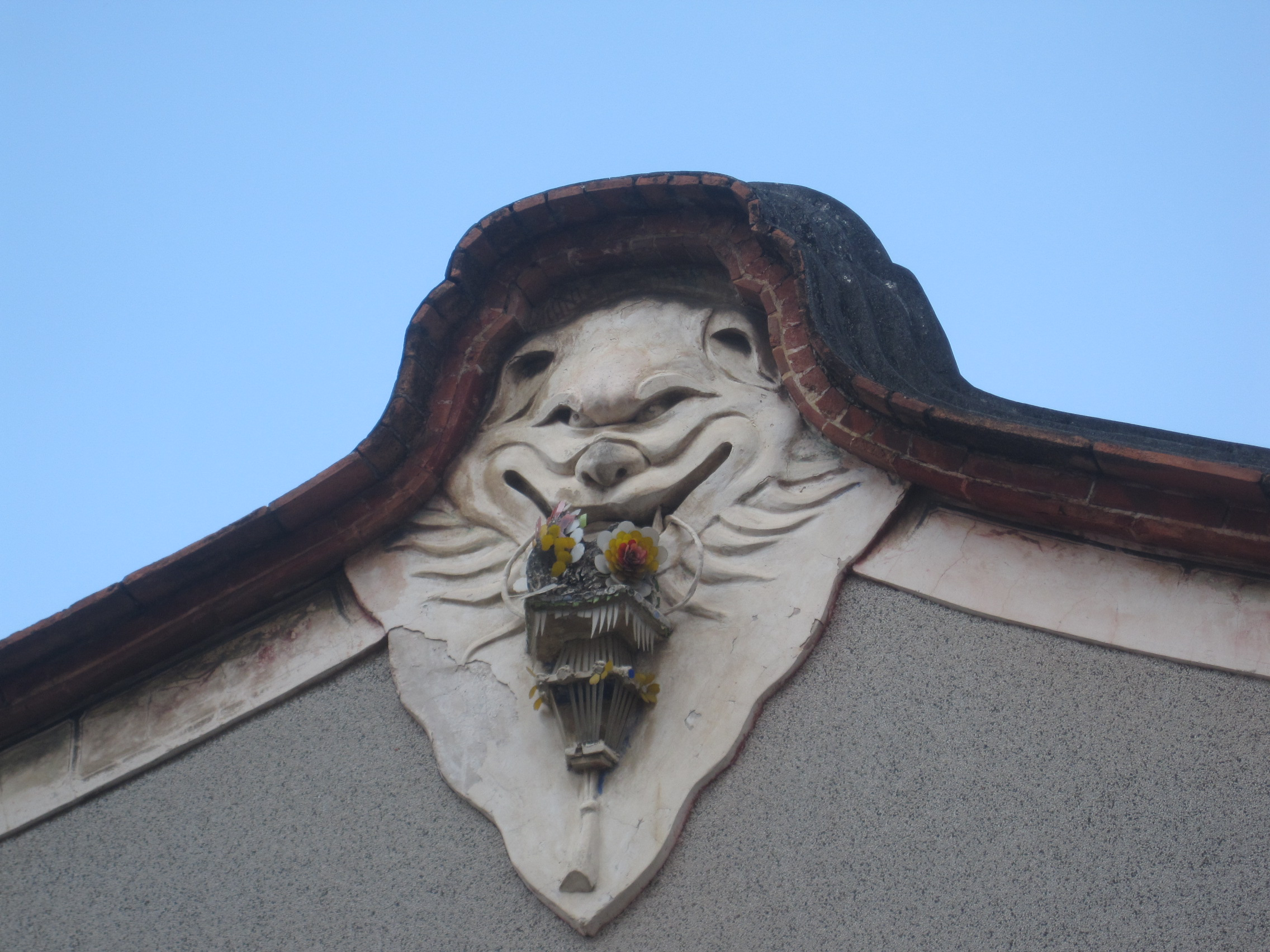 德化堂山牆，五行屬水